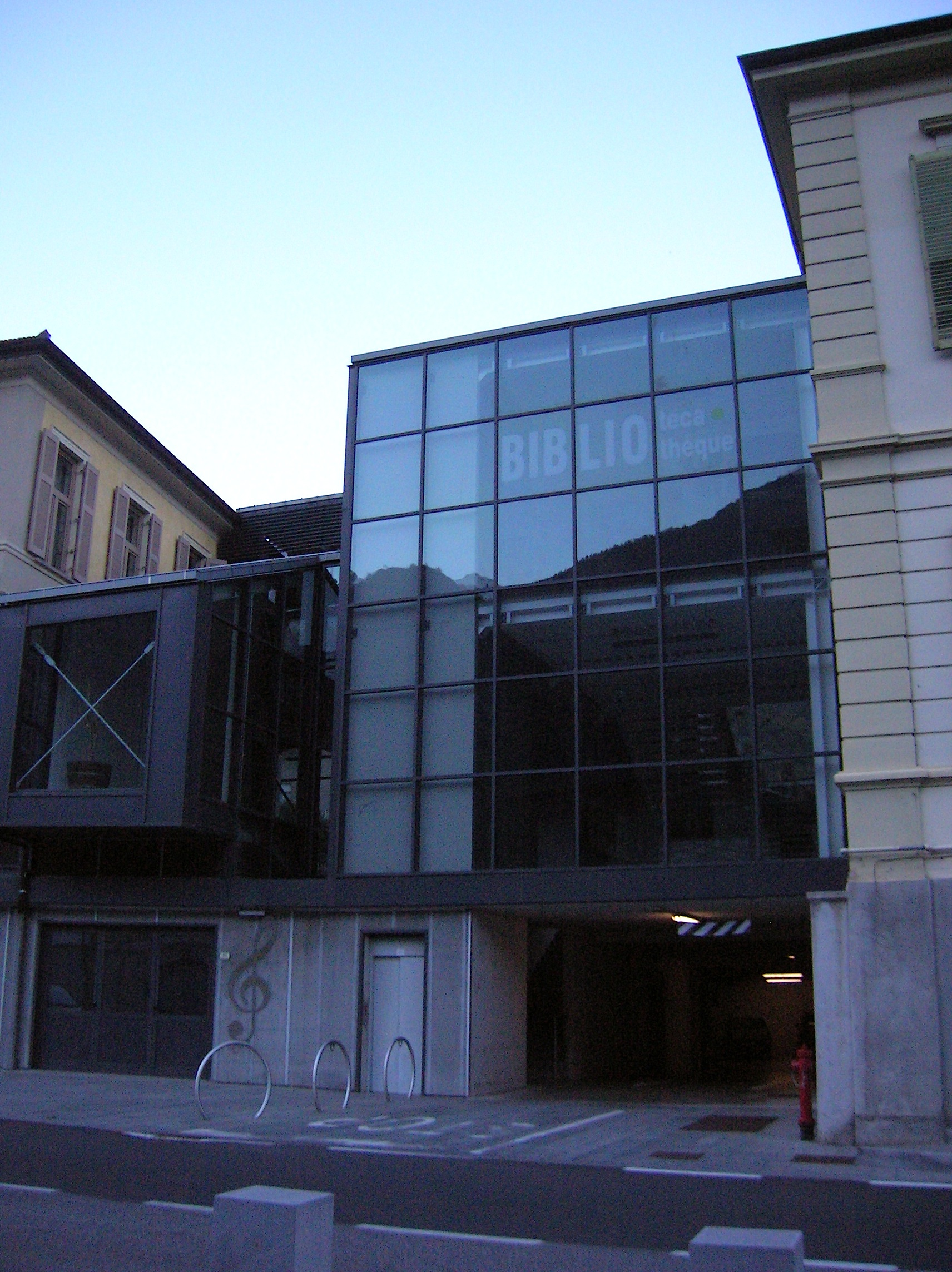 Biblioteca di Donnas, Valle d'Aosta, Italia